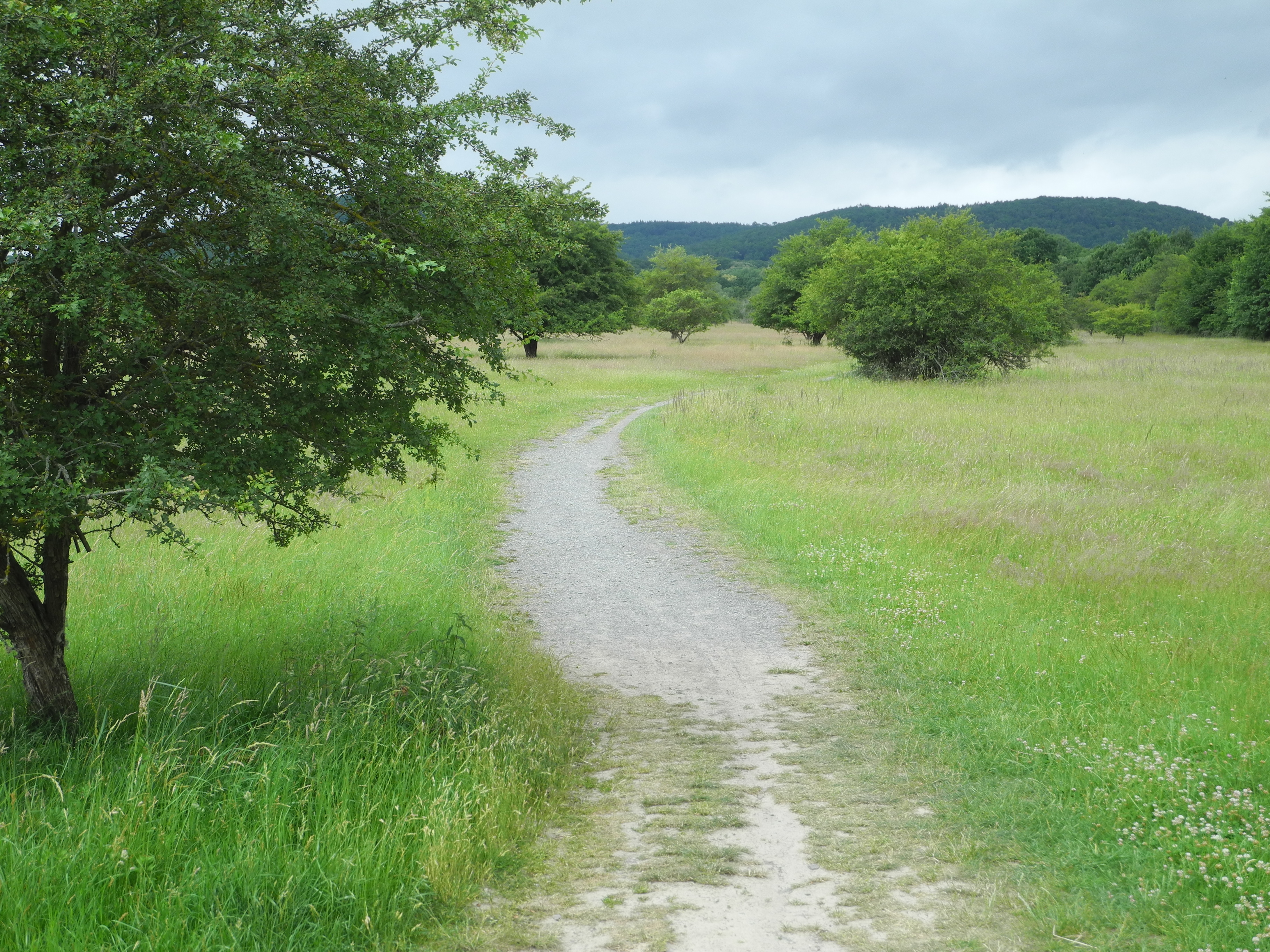 Naturschutzgebiet im Regierungsbezirk Kassel 1611004. „Dönche“ eine Offenlandfläche mit Wald im Südwesten des Stadtgebietes von Kassel, Hessen, Deutschland.